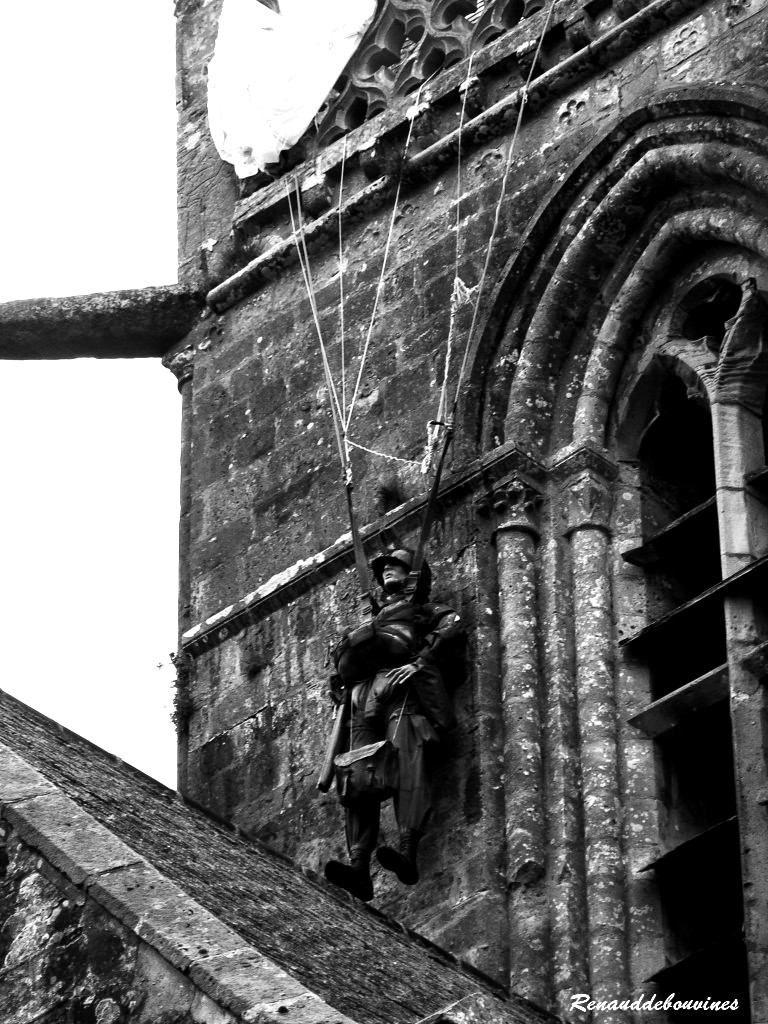 John Steele accroché au clocher de l'église